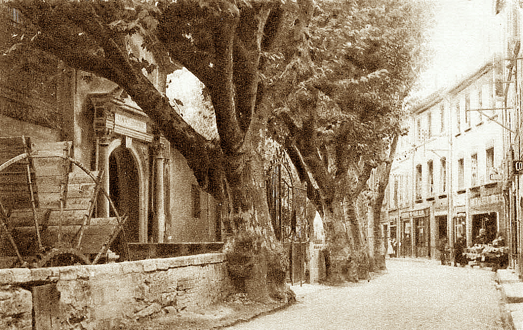 Rue des Teinturiers à Avignon avec une roue à aube jouxtant la chapelle des Pénitents Gris